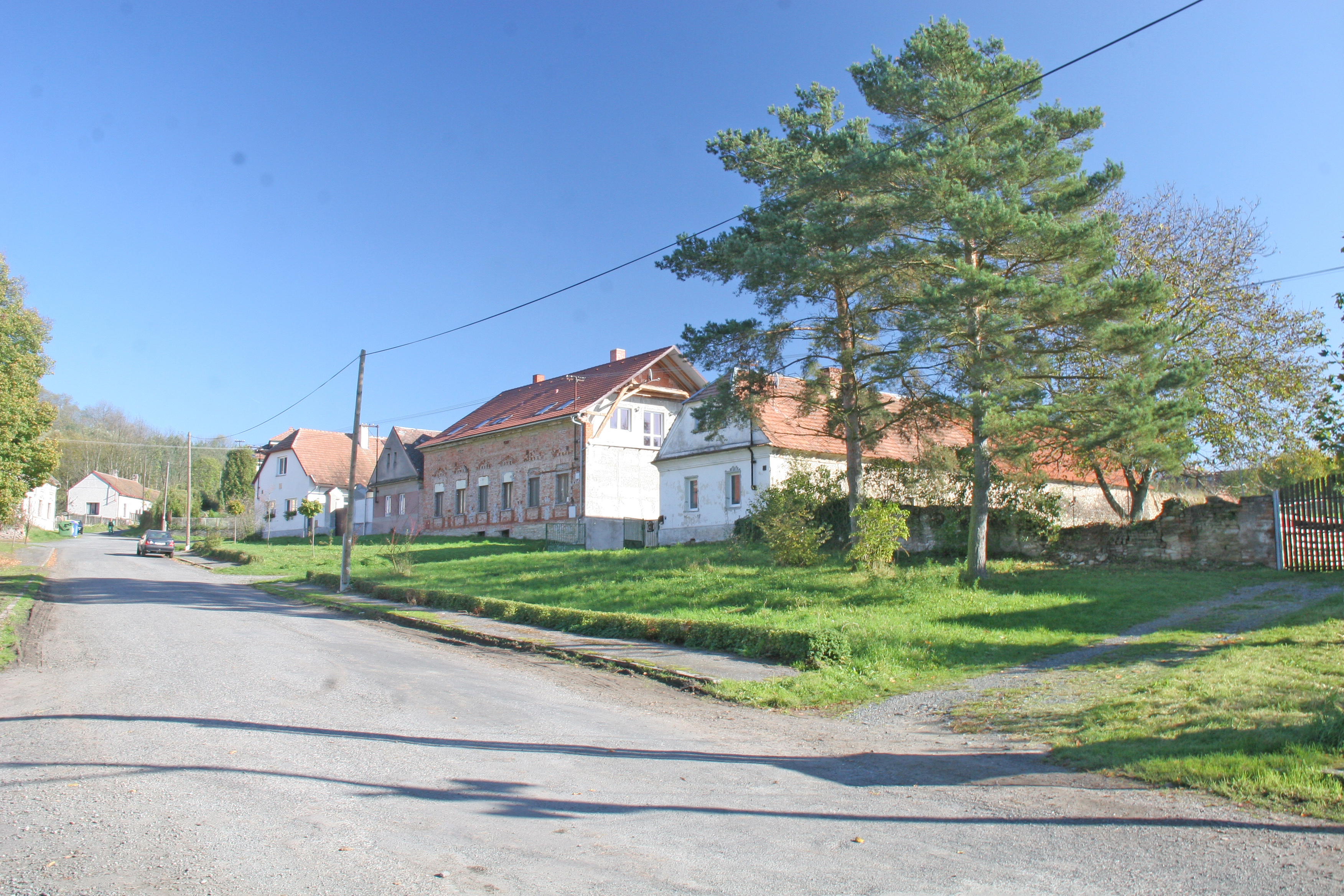 Vinaře čp. 140